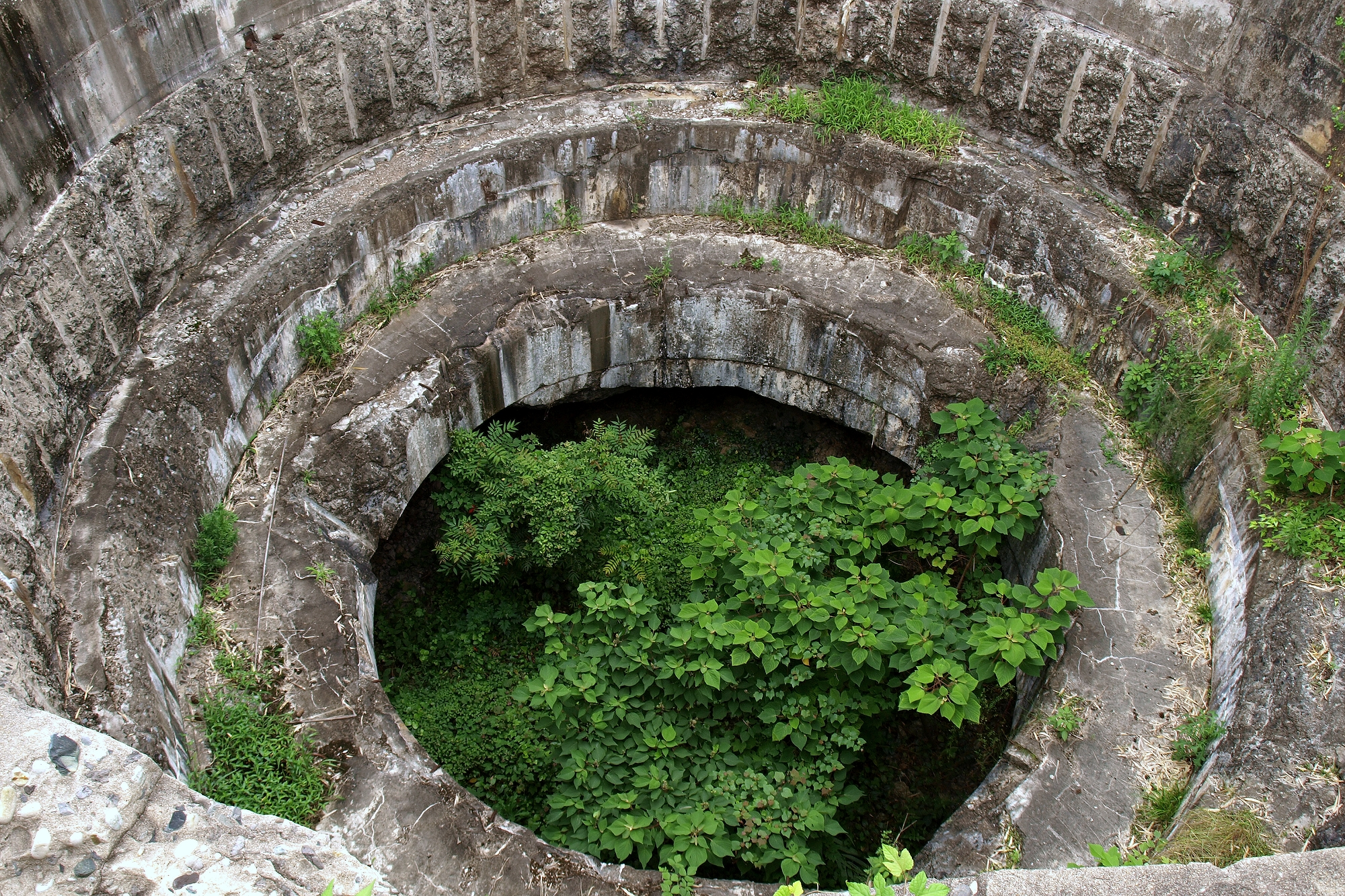 長崎県壱岐市にある「黒崎砲台跡」